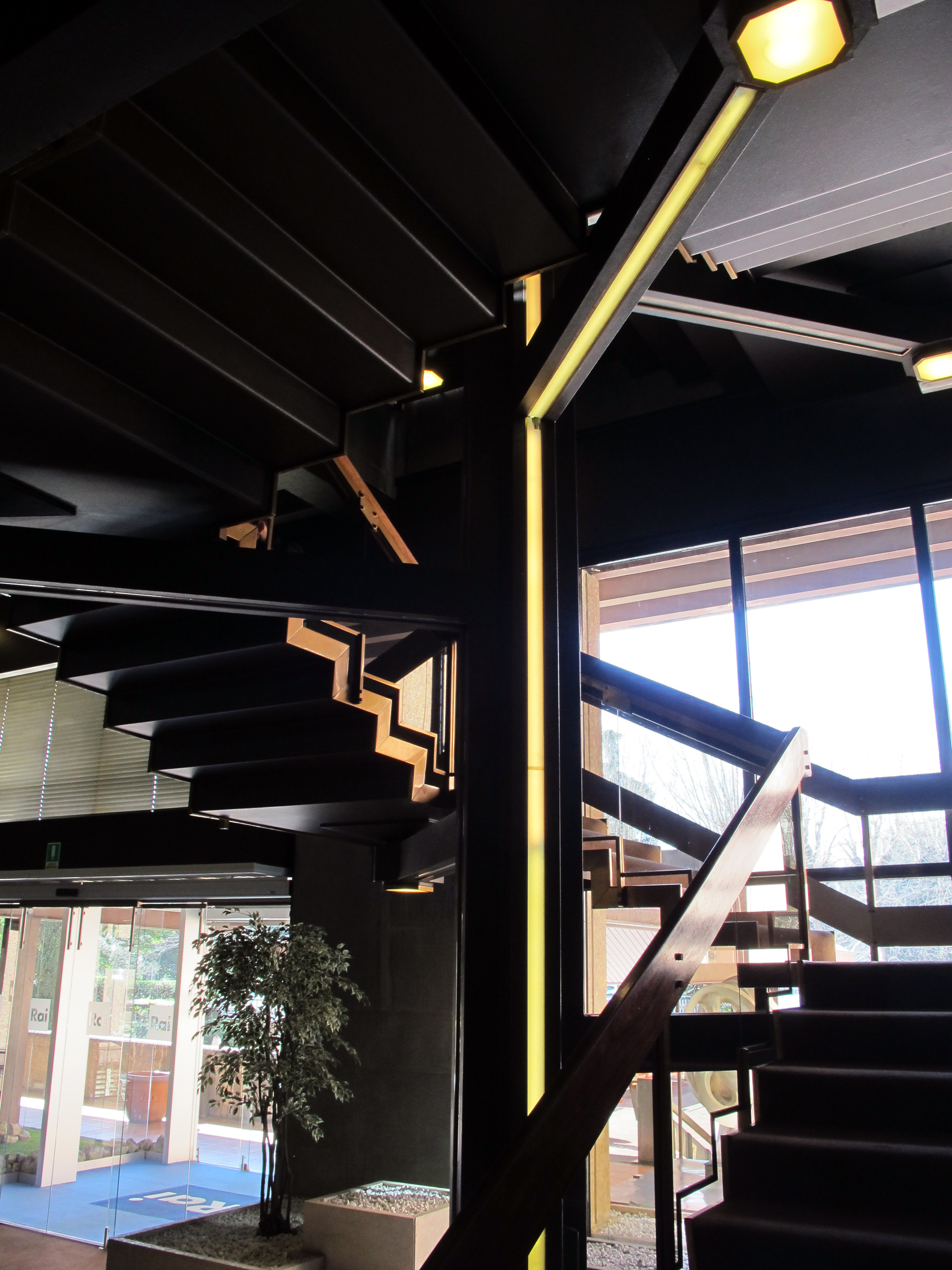 RAI (Firenze)